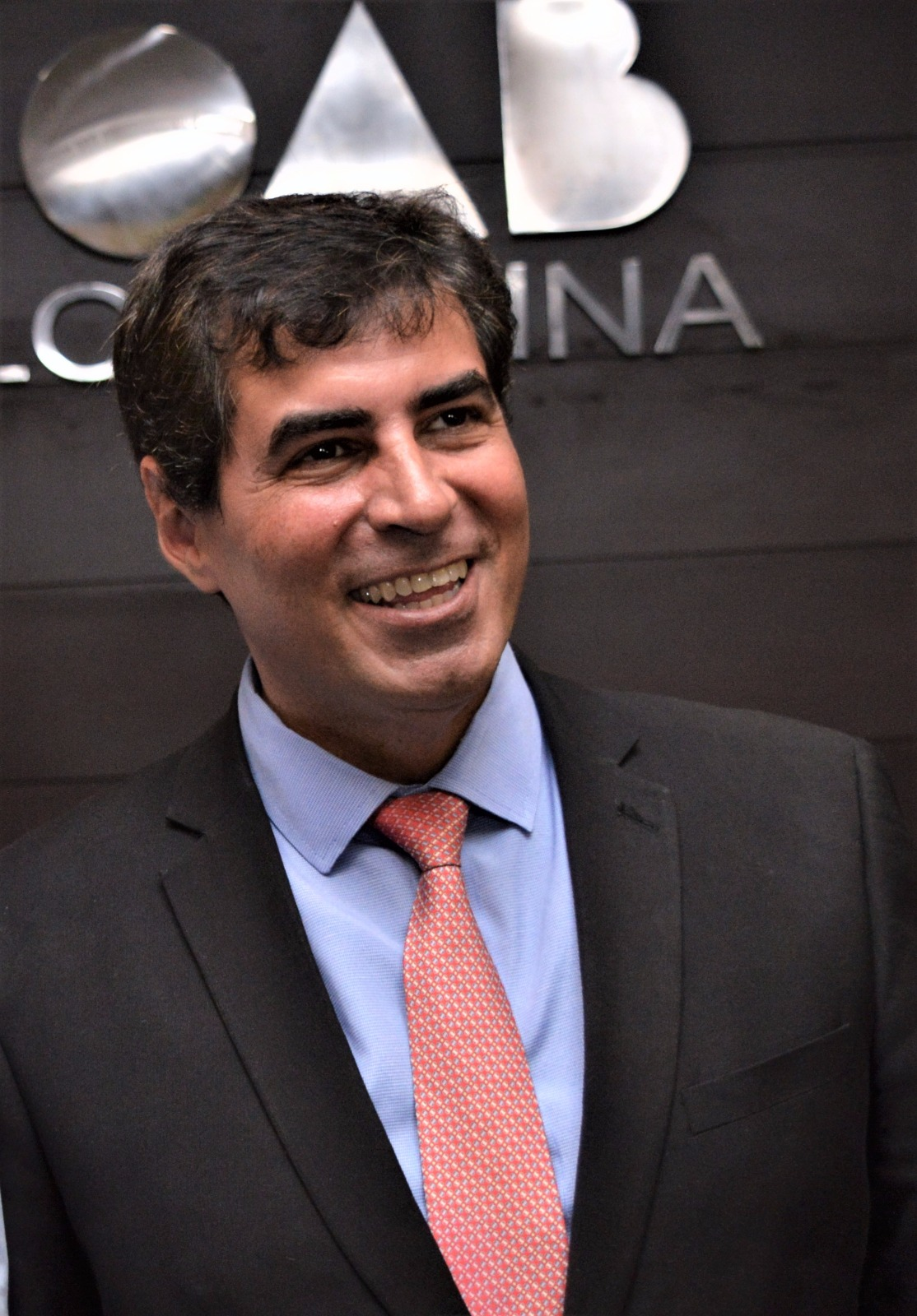 Posse de Marcelo Belinati como Prefeito de Londrina